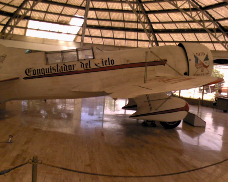 El Conquistador del Cielo, Avión en el que el CPA. Francisco Sarabia Tinoco impuso el record de vuelo sin escalas México - New York.